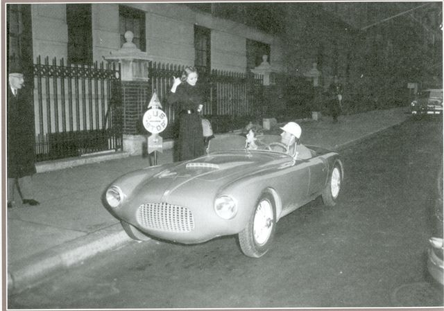 car Bandini 1100 sport